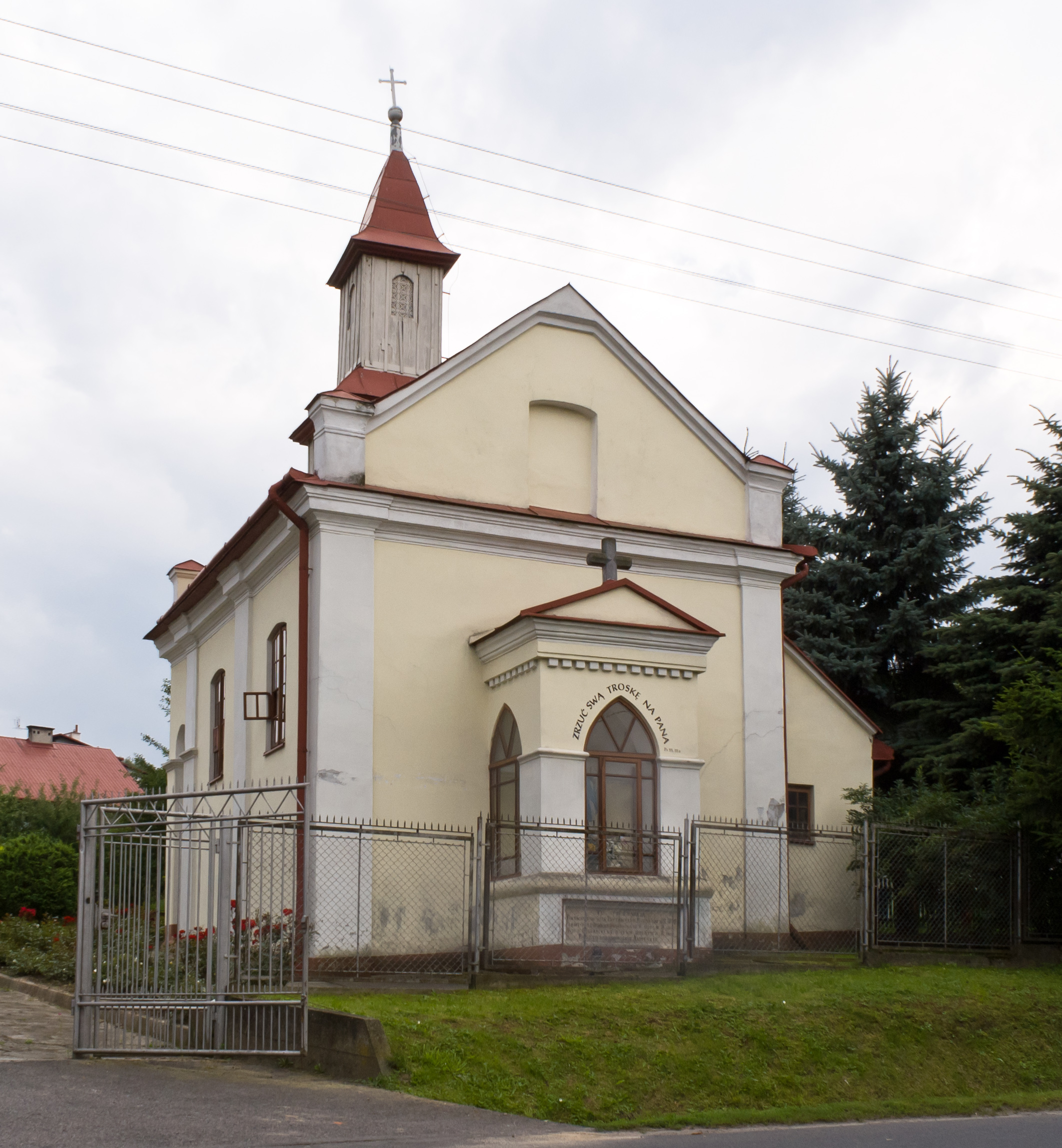 Kaplica rodziny Drużbackich w Prałkowcach